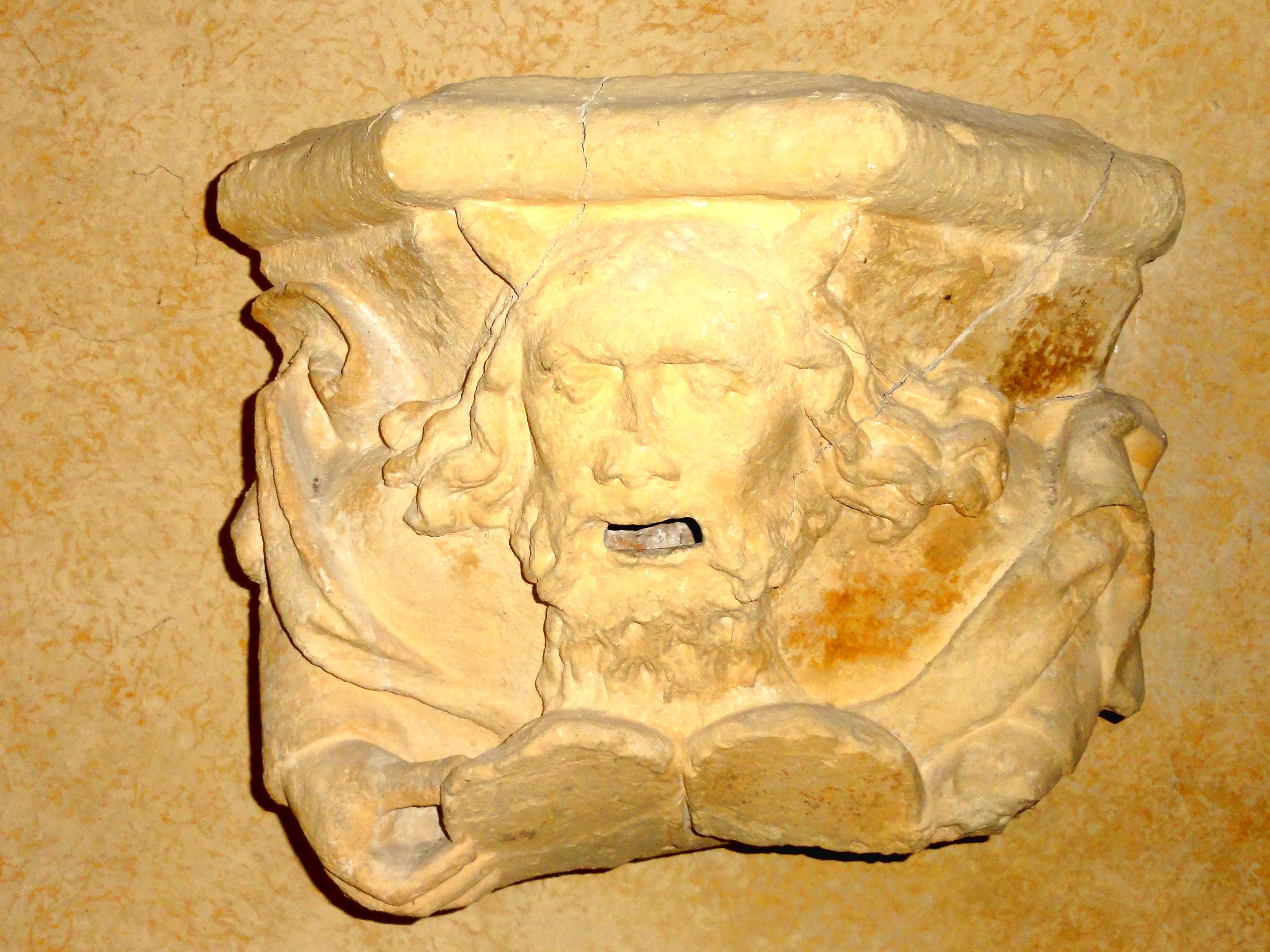 Mobilier de l'église - voir titre.